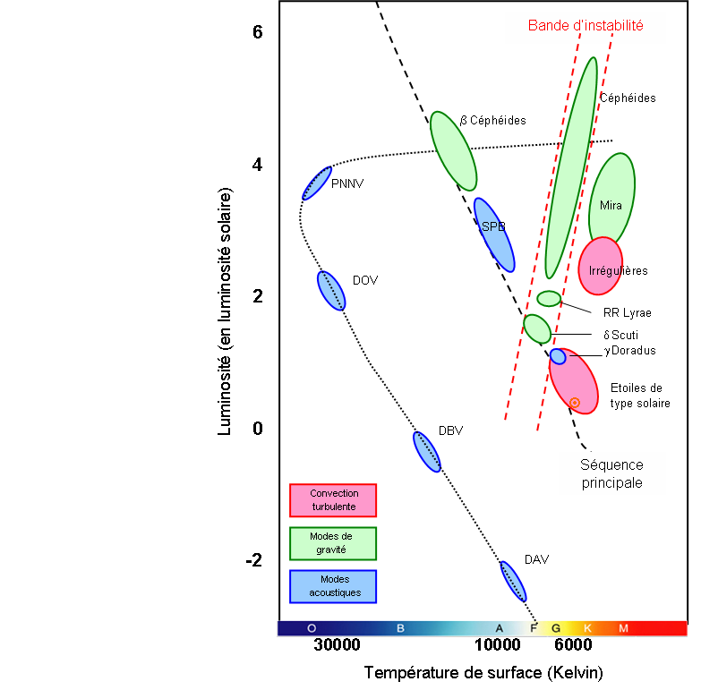 6. Diagramme de Hertzsprung – Russel (HR) des étoiles pulsantes : Le diagramme HR représente les étoiles en fonction de 2 observables, leur température de surface et leur luminosité. La position des différents types connus d’étoiles oscillantes y est illustrée. Les couleurs représentent les différents types d’oscillations attendus. En bleu et vert, c'est une perturbation du profil de l'opacité influençant le transfert de l’énergie qui déclenche un mécanisme de piston (mécanisme kappa), excitant respectivement des modes acoustiques de gravité. En rouge, ce sont les mouvements turbulents de convection à la surface, comme pour le Soleil. Dans la bande d’instabilité (régions où les oscillations sont entretenues par le mécanisme kappa) se situent les Céphéides et les RR Lyrae. La ligne en tiret représente la séquence principale (SP), la phase durant laquelle les étoiles consomment l'hydrogène de leur noyau le transformant en hélium. Les étoiles y sont dans un état stable et leur structure change à cause de la lente modification de leur composition chimique. Les étoiles passent ainsi la plus grande partie de leur vie sur la séquence principale. En dehors de celle-ci, les étoiles sont au début ou à la fin de leur vie. Sur et près de la SP, du plus froid au plus chaud, on trouve les pulsateurs de type solaire,  Doradus,  Scuti, SPB et  Céphéides. La région des Mira correspond à la branche des géantes rouges*. La ligne pointillée représente l’évolution des naines blanches lors de leur refroidissement, classés en fonction de leur type spectral (O, B, A). (D’après Christensen-Dalsgaard)